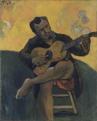 Depicted person: Francisco Paco Durrio (1868 - 1940)